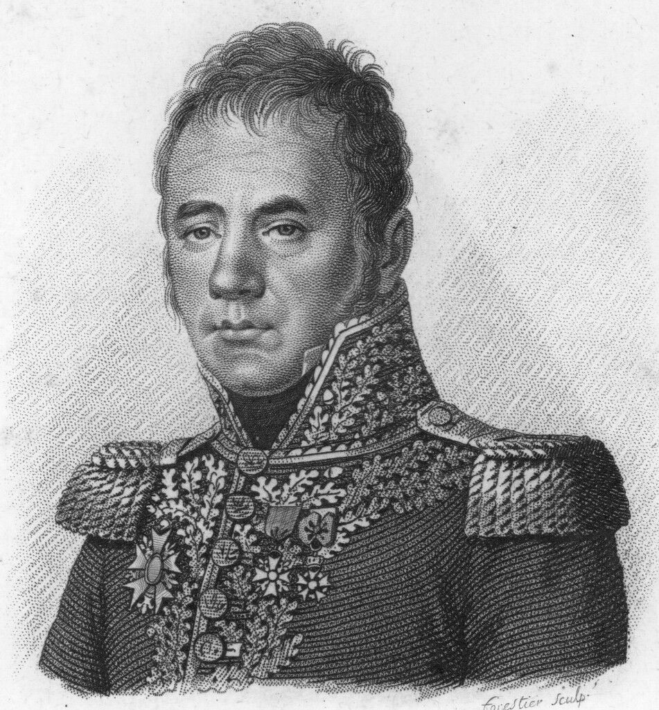 Le général de division baron Pierre Joseph Habert. Vétéran des campagnes d'Autriche, de Prusse et de Pologne, il se distingue en Espagne où il obtient le commandement d'une division du corps du maréchal Suchet.